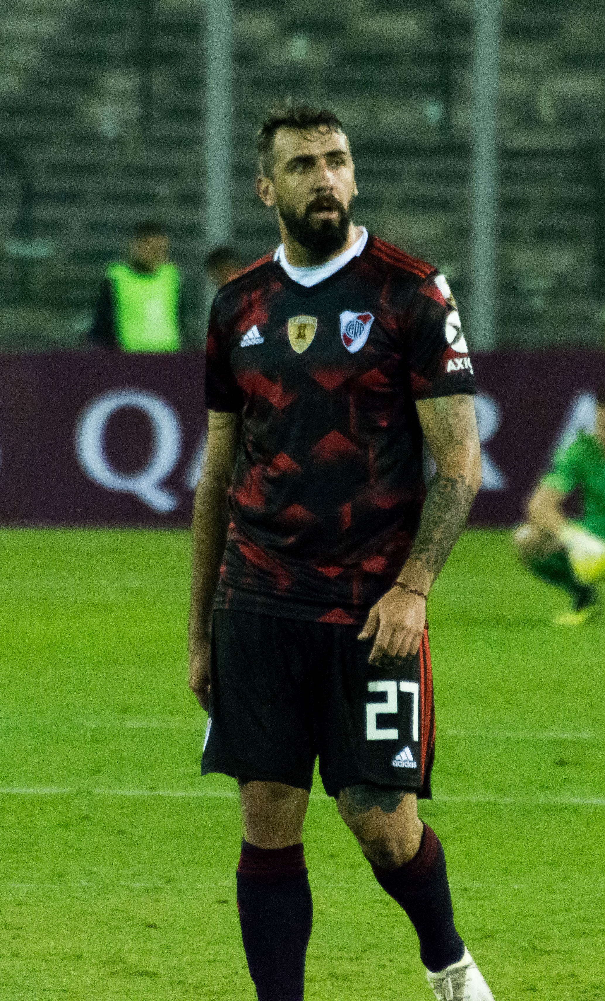 Palestino v River Plate, Estadio Monumental, Macul, Santiago, Región Metropolitana, Chile.